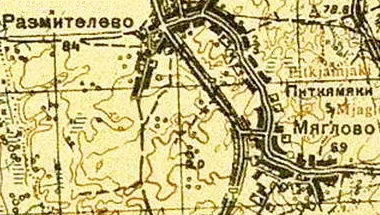 Деревня Питке-Мяки на топографической карте Ленинградской области.